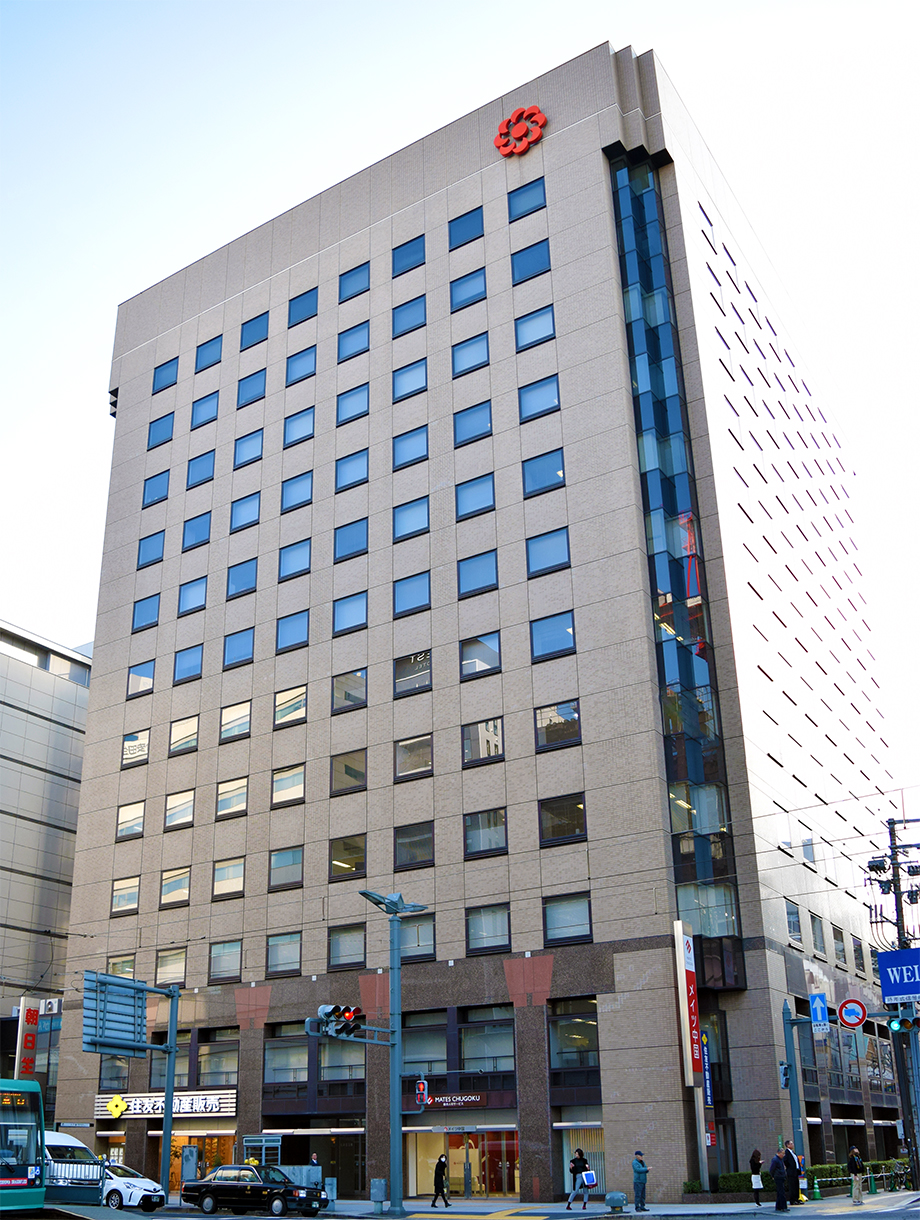 朝日生命広島胡町ビル